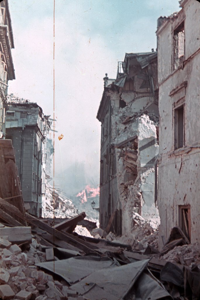 Ulica Krzywe Koło w Warszawi